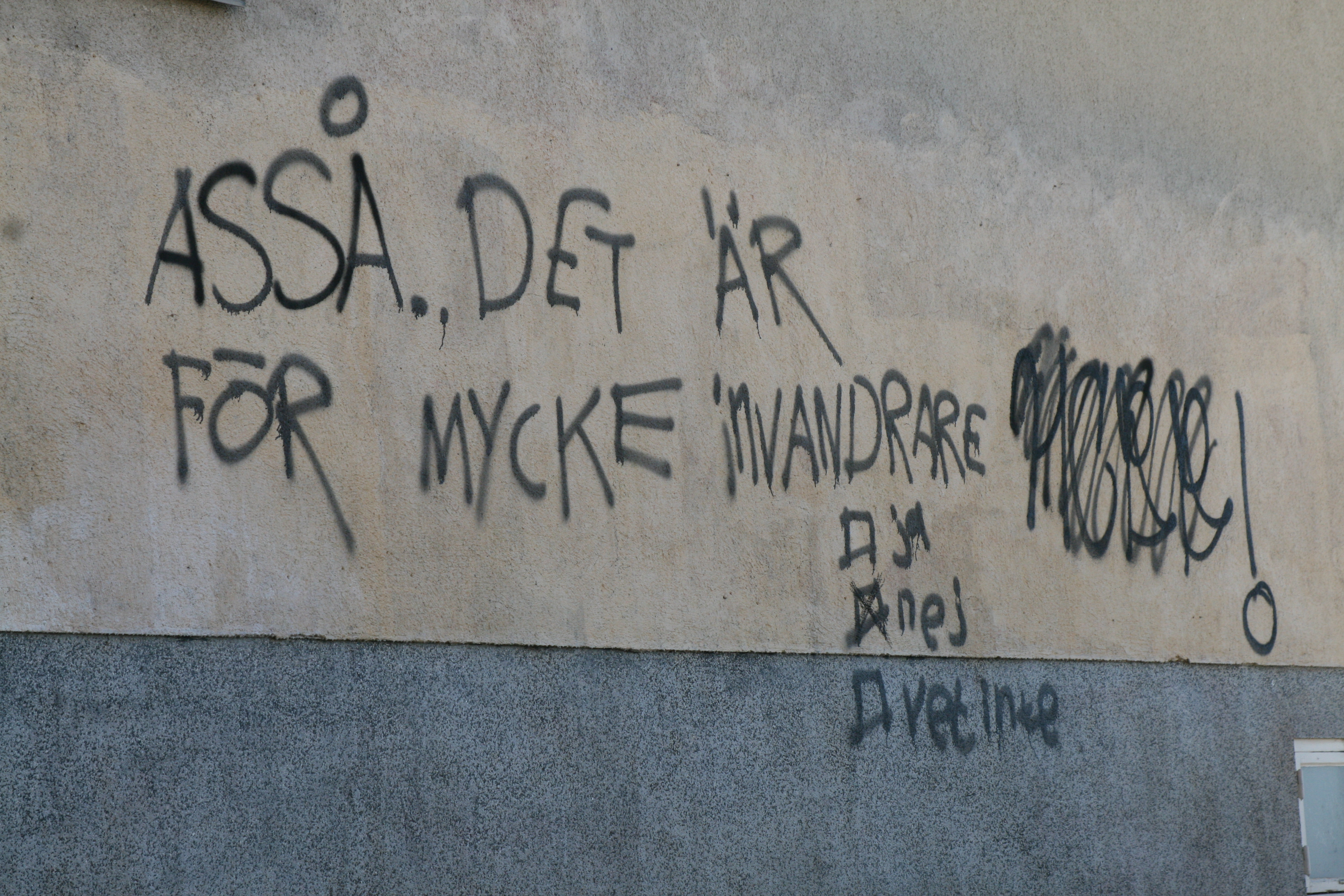 Political graffiti in Umeå about immigration